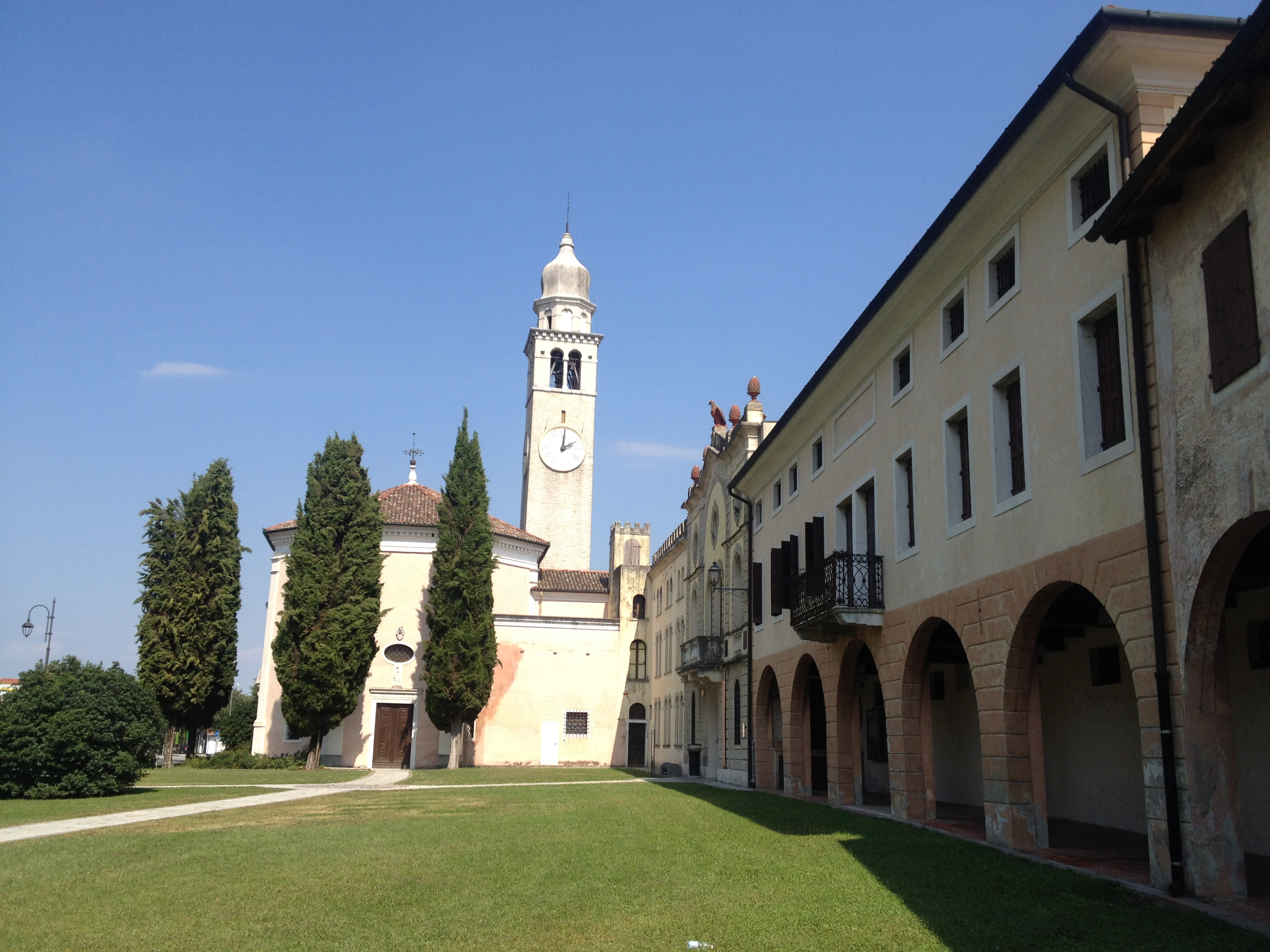 Santuario, Palazzo Cecchini e Palazzo Mainardi